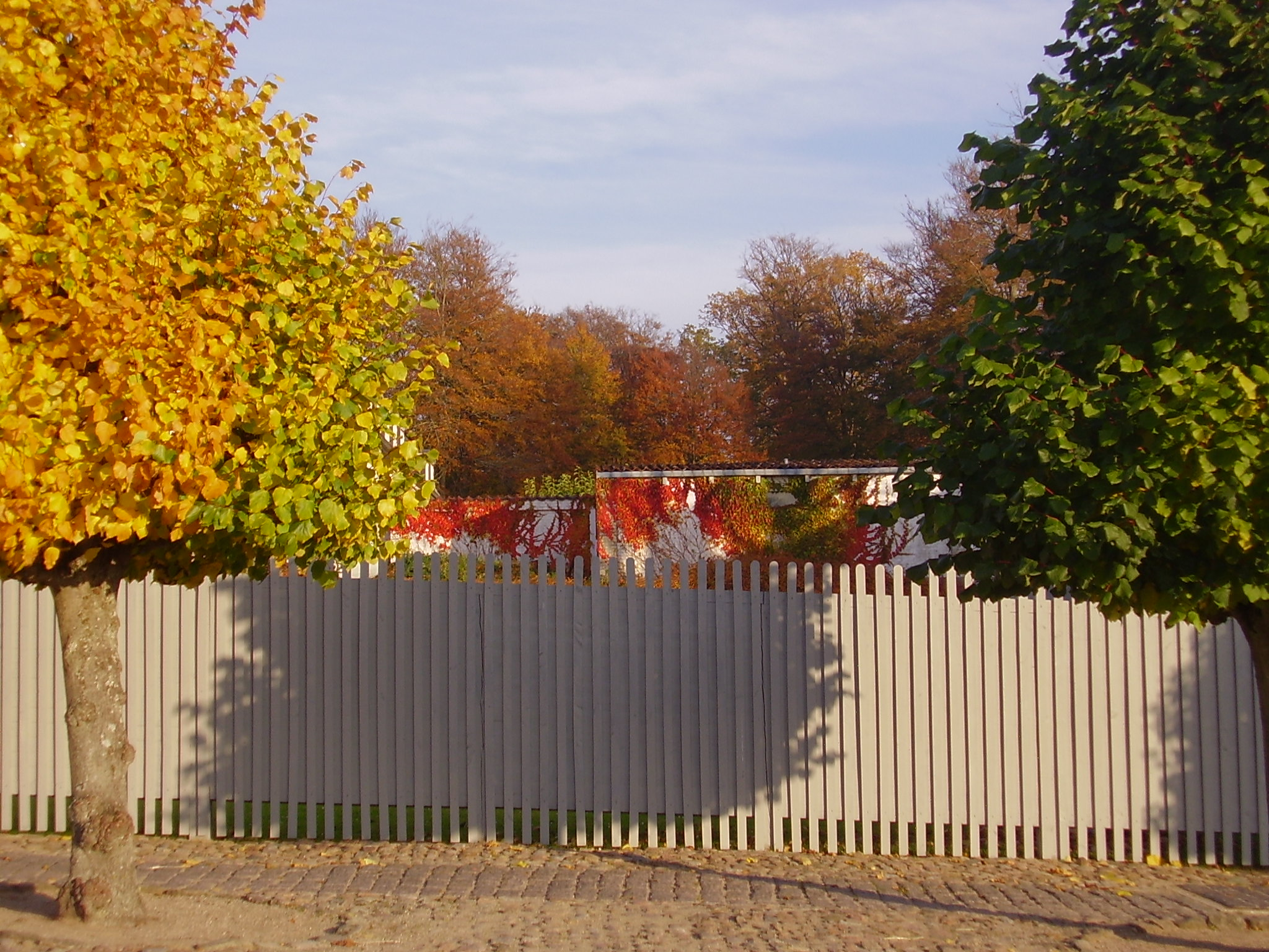 Høstbillede - tatt nær Frederiksborg, Sjælland 29.10.2005.